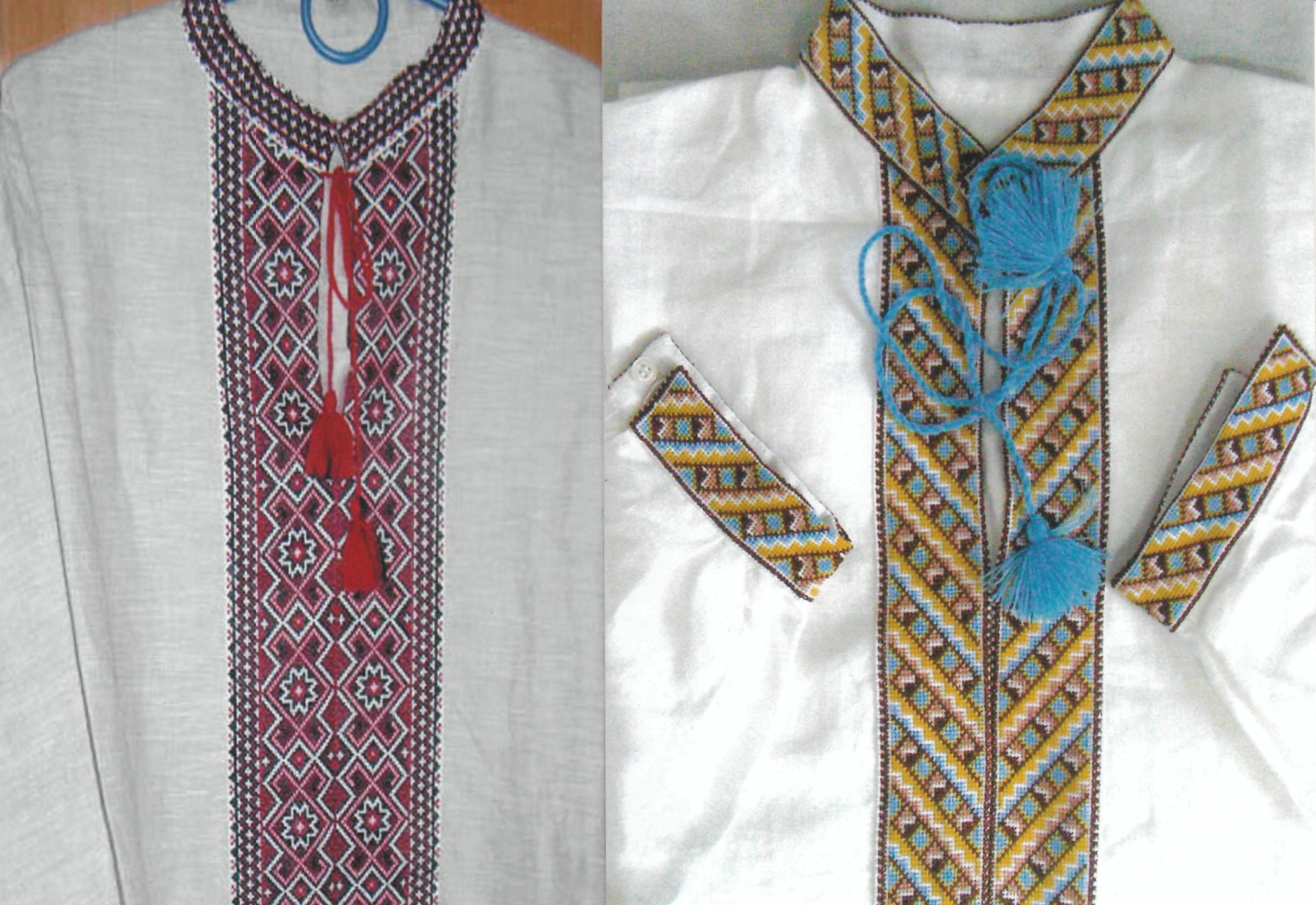 Вишивка Магдалини Кучінки